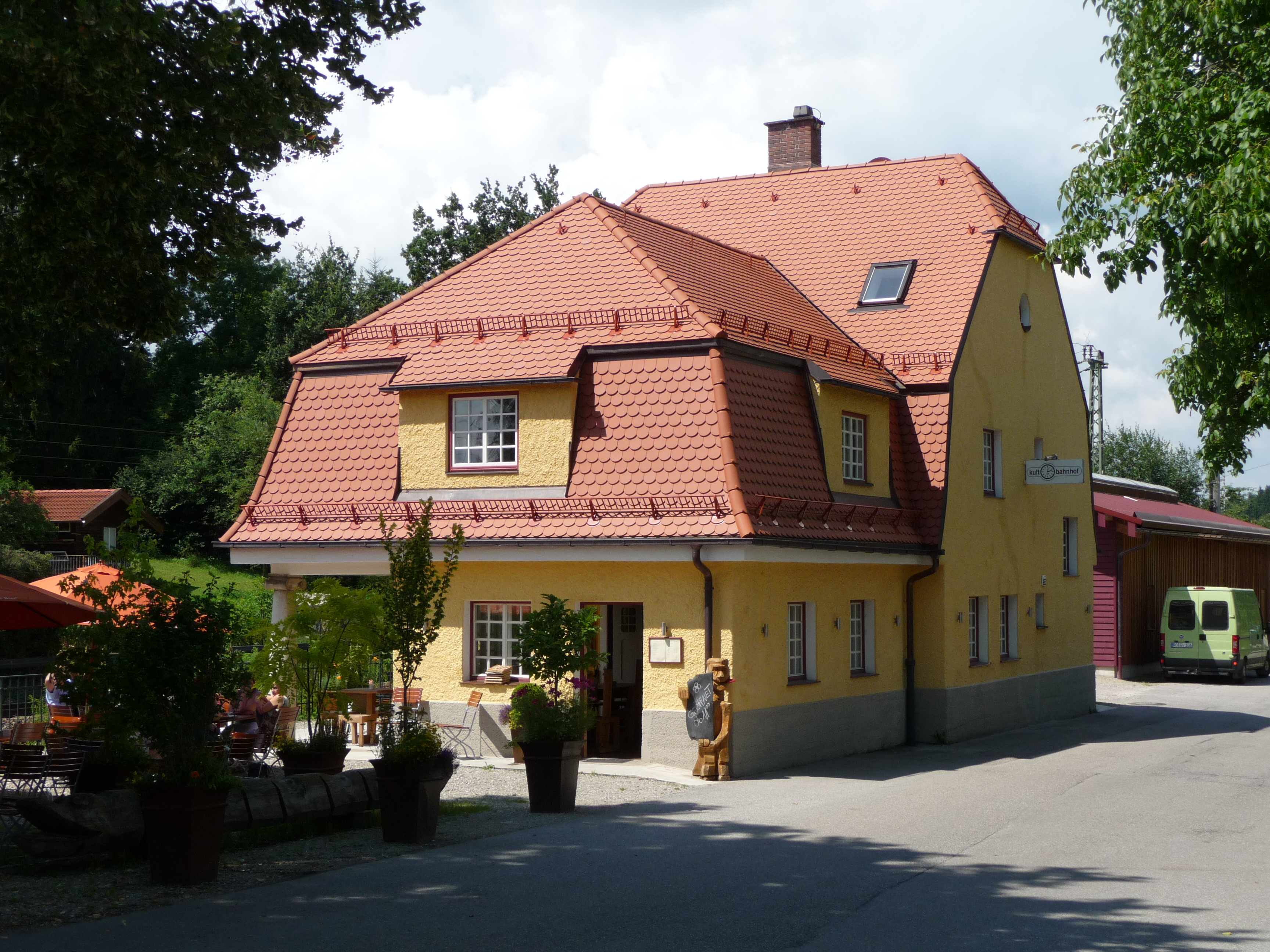 Rimsting (Bahnhof), Kulturbahnhof